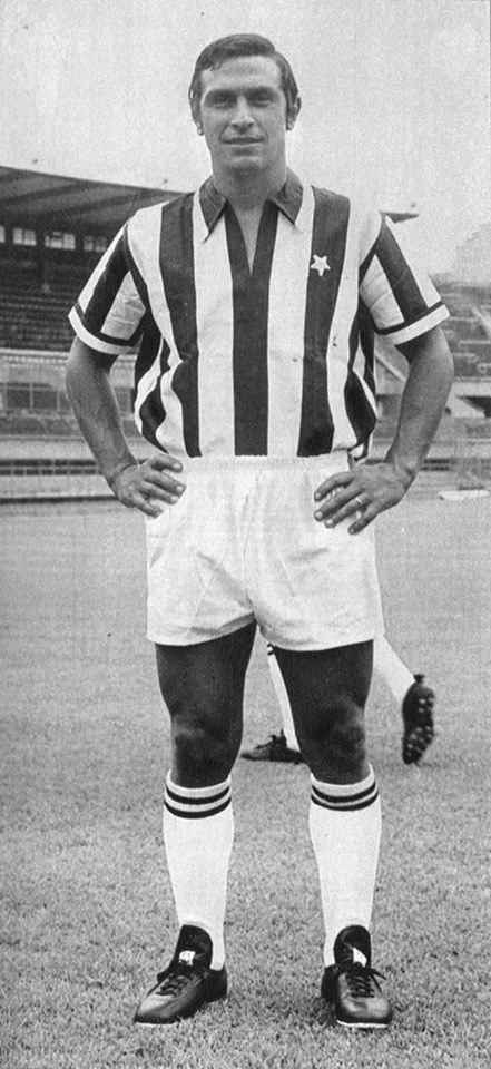 Il calciatore italiano Lamberto Leonardi alla Juventus all'inizio della stagione 1969-70, in posa all'interno dello stadio Comunale di Torino.